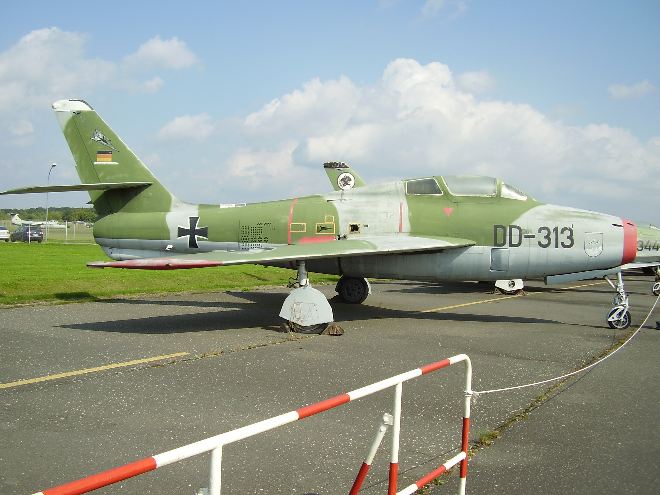 Luftwaffenmuseum der Bundeswehr; Airforce Museum of the Bundeswehr; Berlin-Gatow, F-84F